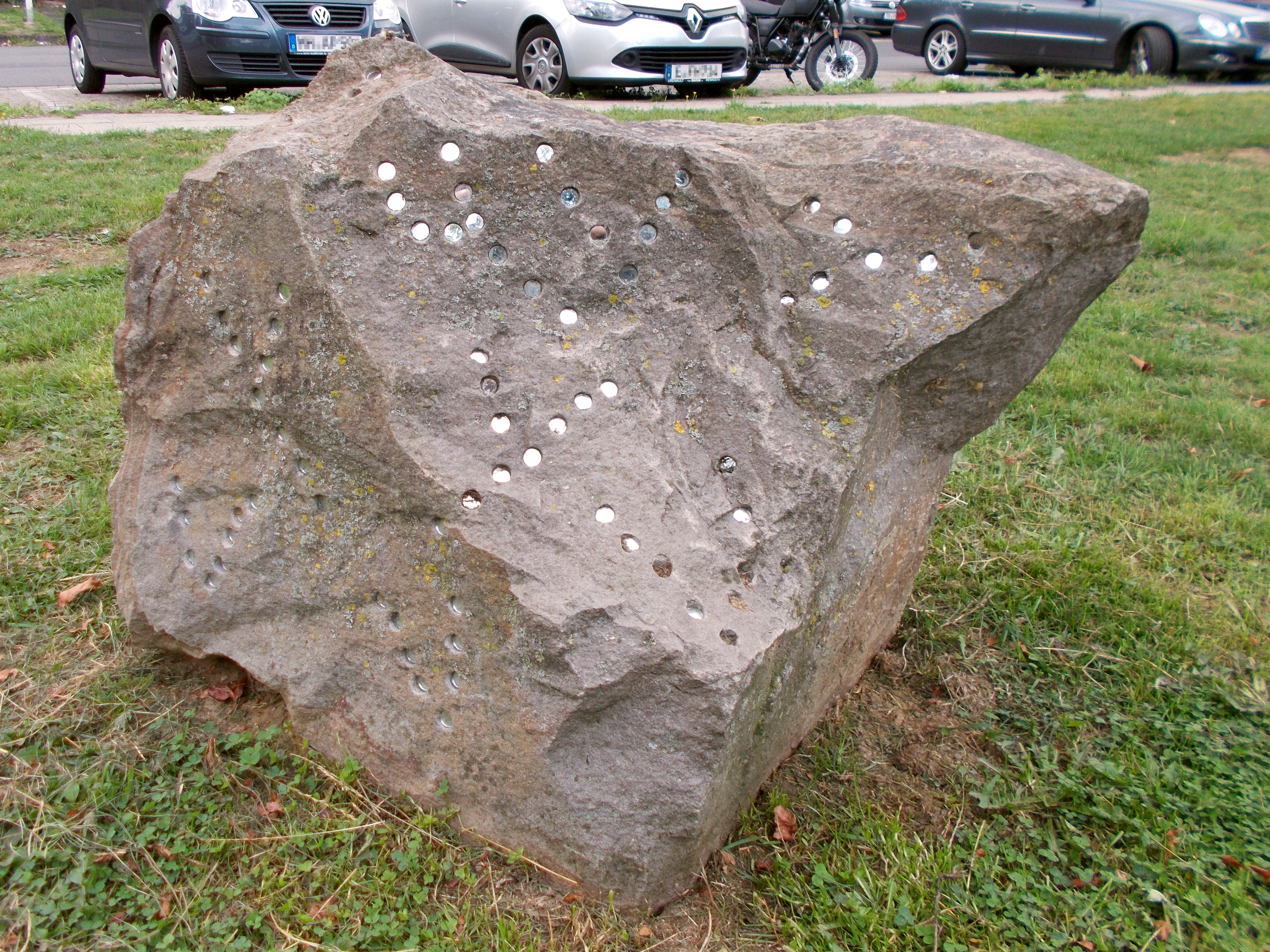 Zu Ehren Emil von Behring gestaltete 2013 die Mülheimer Künstlergruppe "AnDer" e. V. den Von-Behring-Platz. Skulptur "Pierre de Bacterie" von Uwe Dieter Bleil.